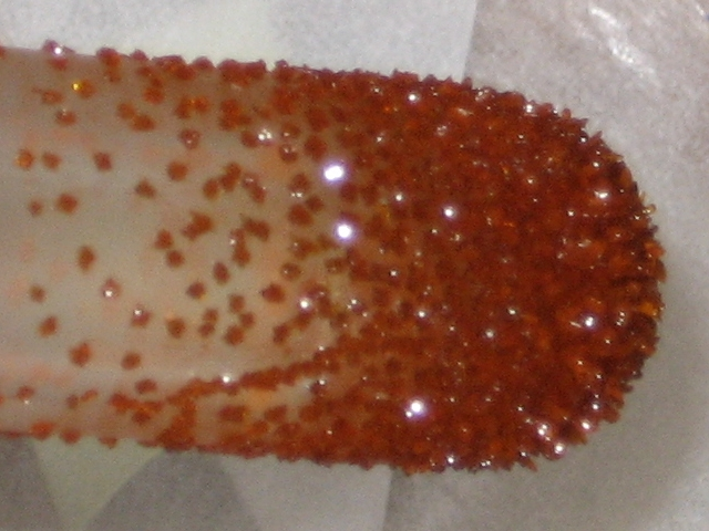 Ferrocen (nach Aufreinigung durch Sublimation)